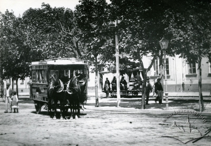 Омнібус №12 на вулиці Дорого до двірця (сьогодні - Чернівецька) у Львові. На задньому плані - конка